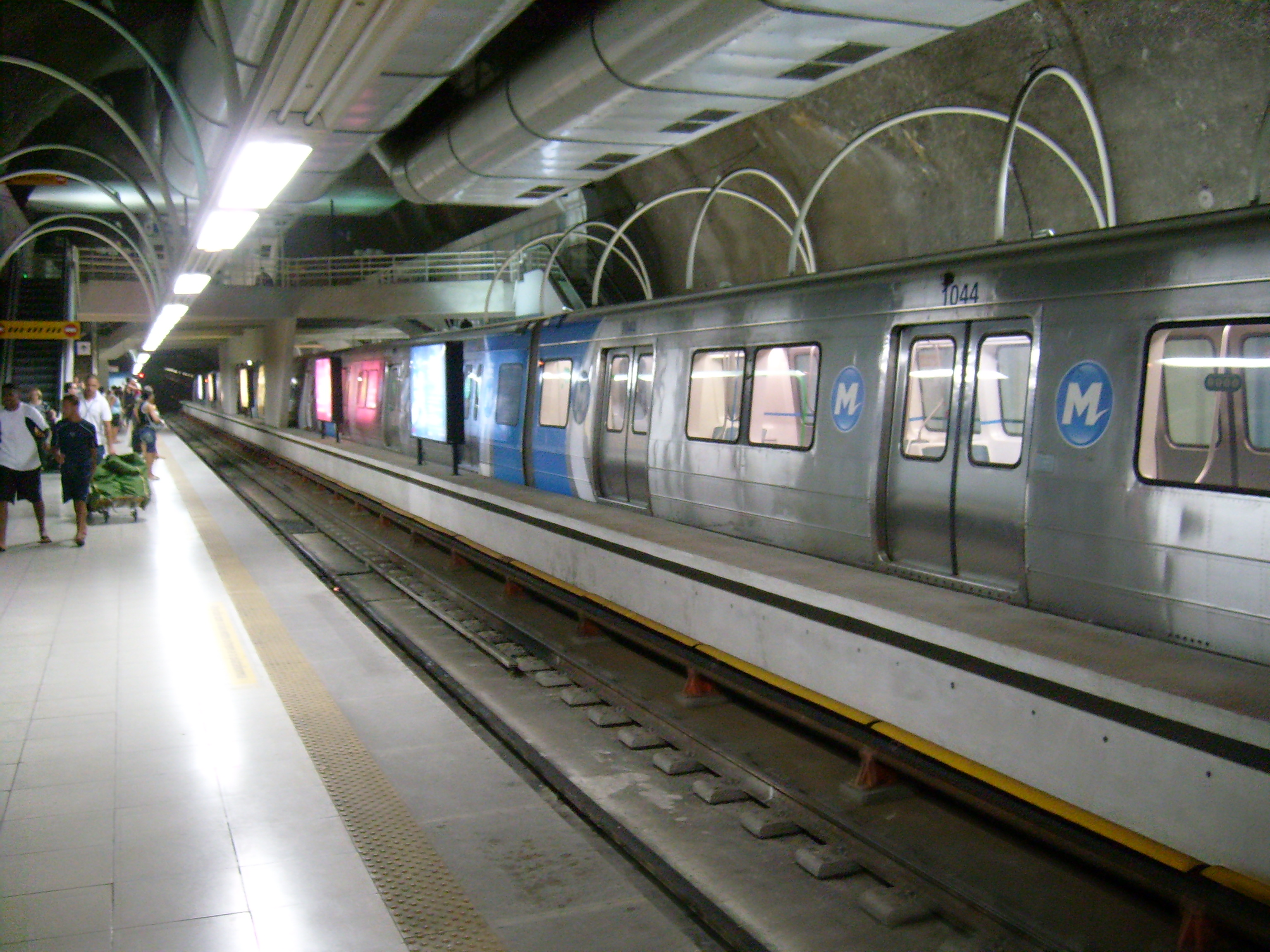 Trem parado na Estação Cantagalo de Metrô, no Rio de Janeiro.